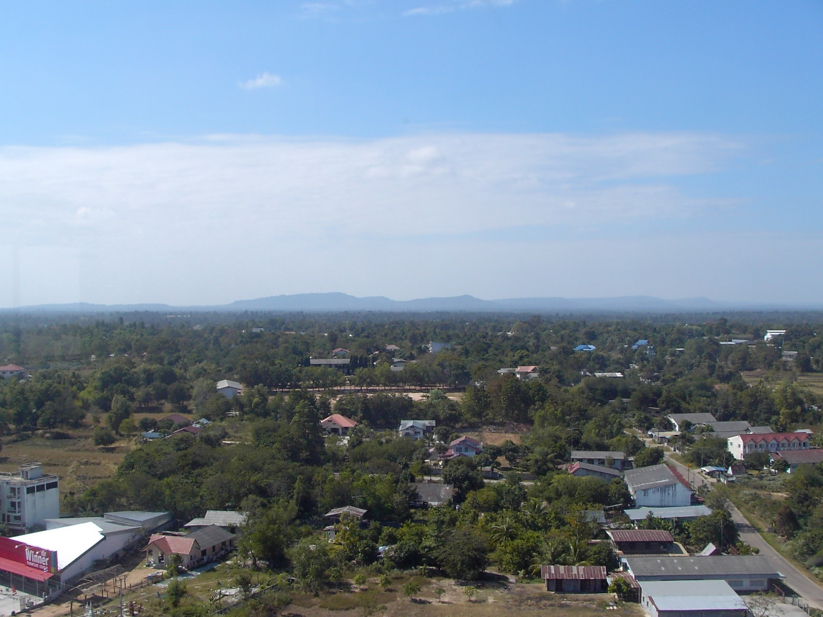 Mukdahan Haw Kaew Observation Deck SW View